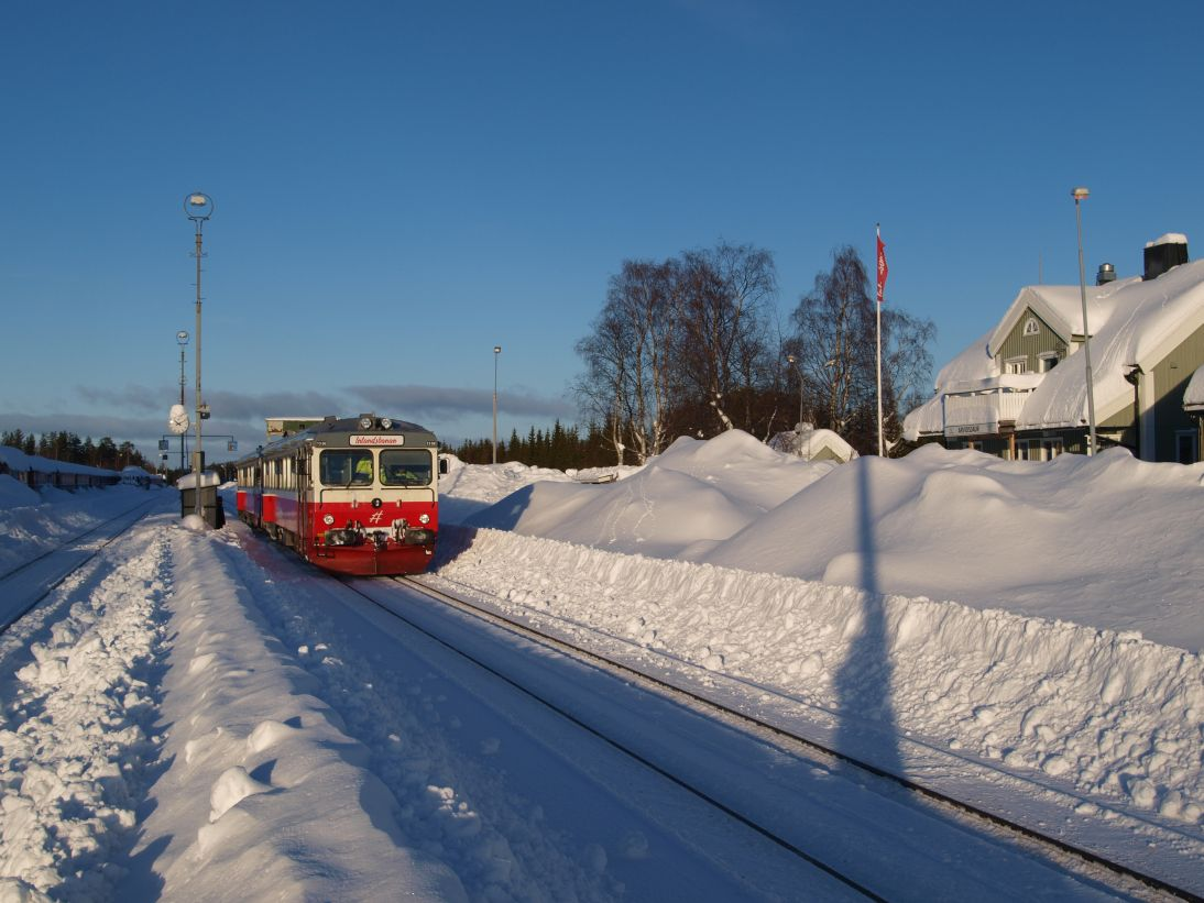 Bahnhof Arvidsjaur am 6. Februar 2015